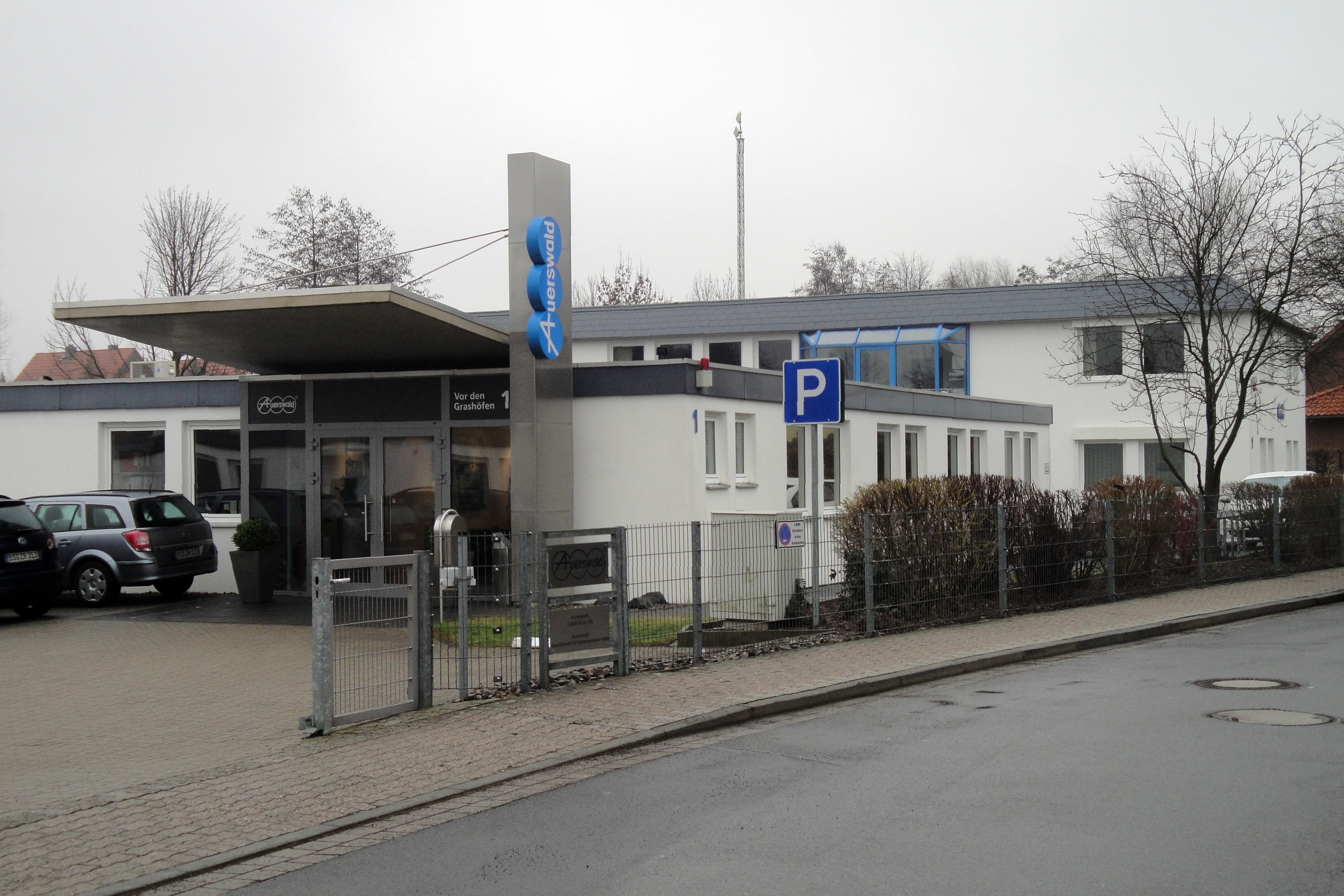 Auerswald GmbH & Co. KG (Verwaltung) in Schandelah